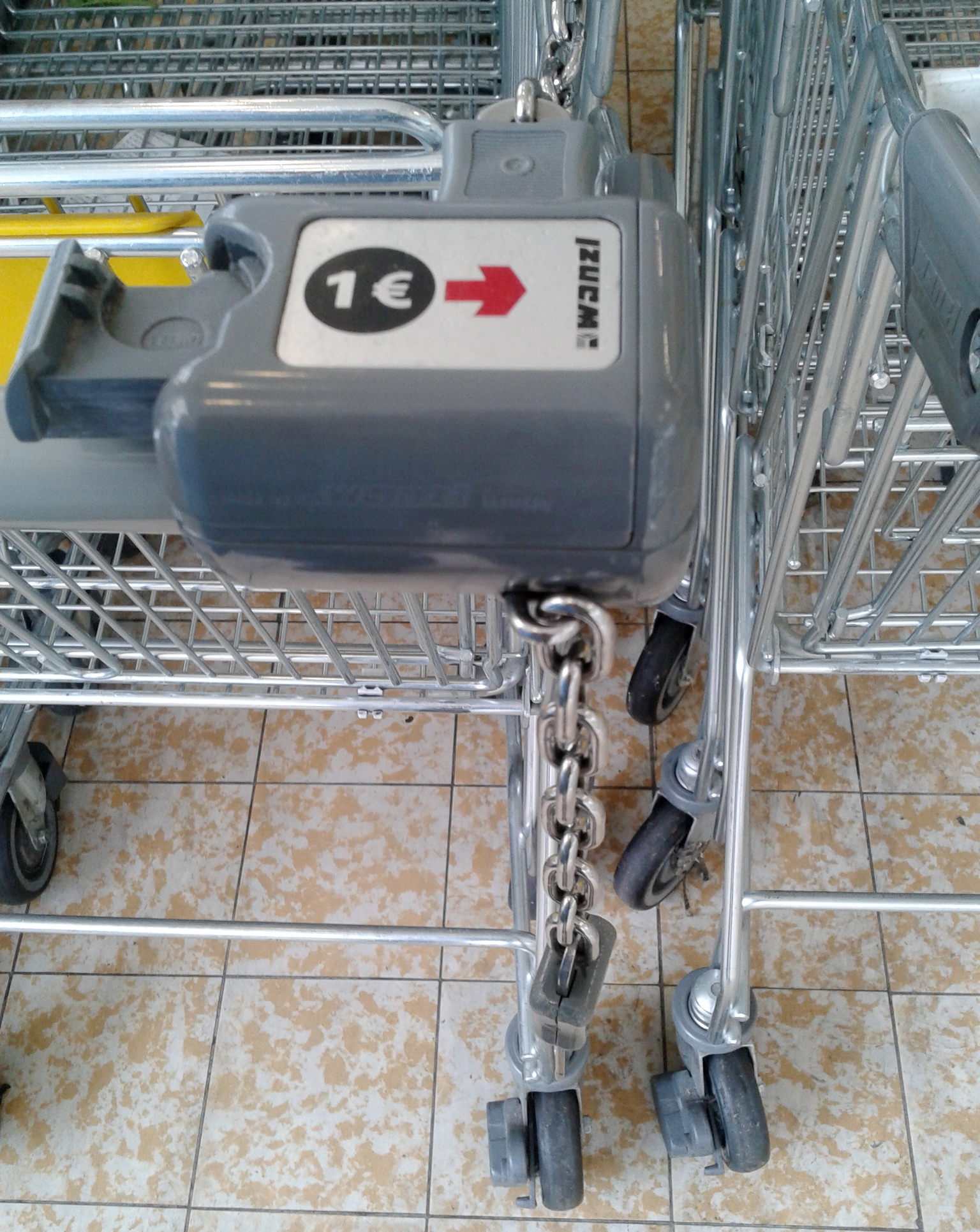 Pfandschloss bei Aldi